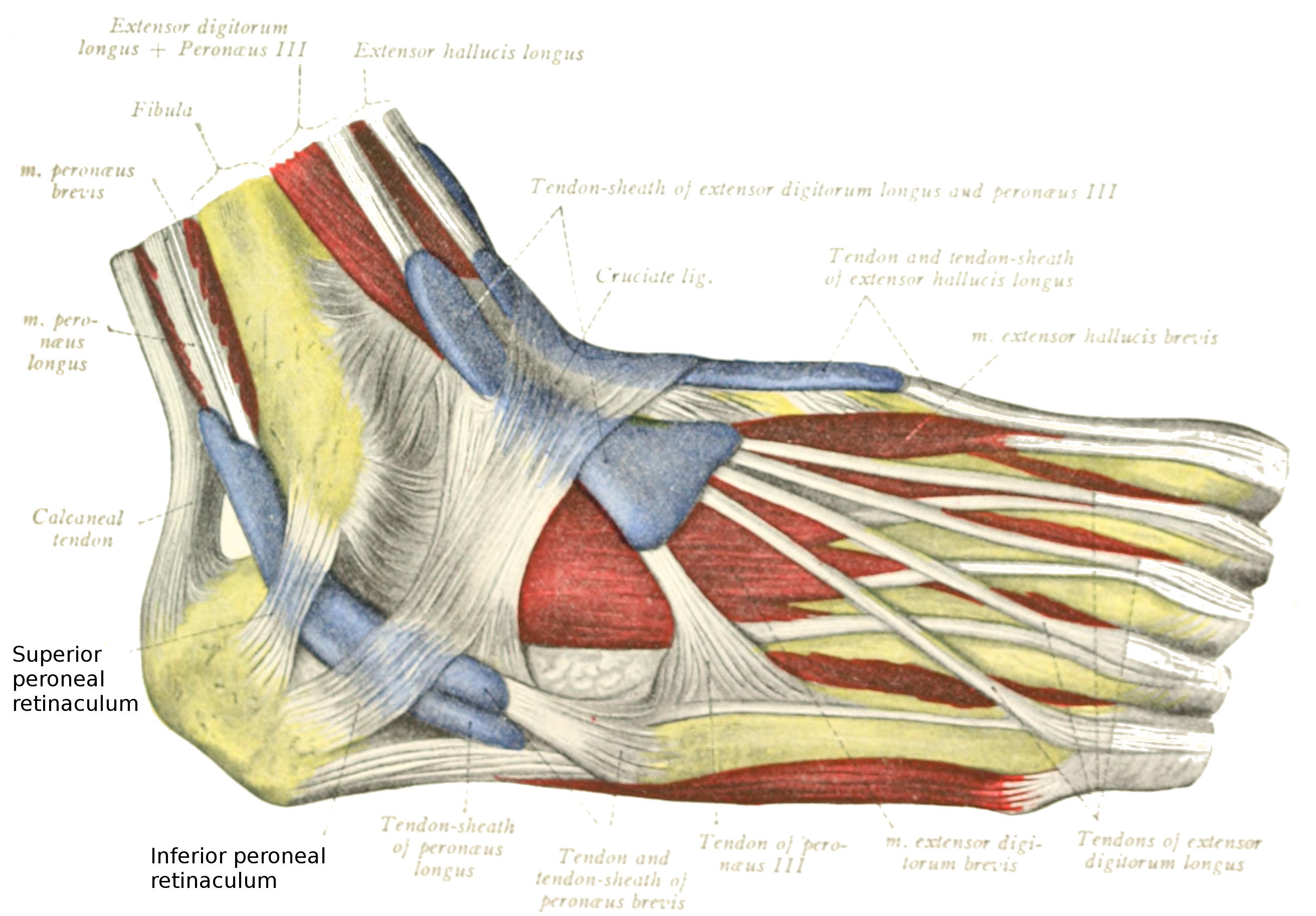 Retinaculum musculorum peroneorum superius et inferius